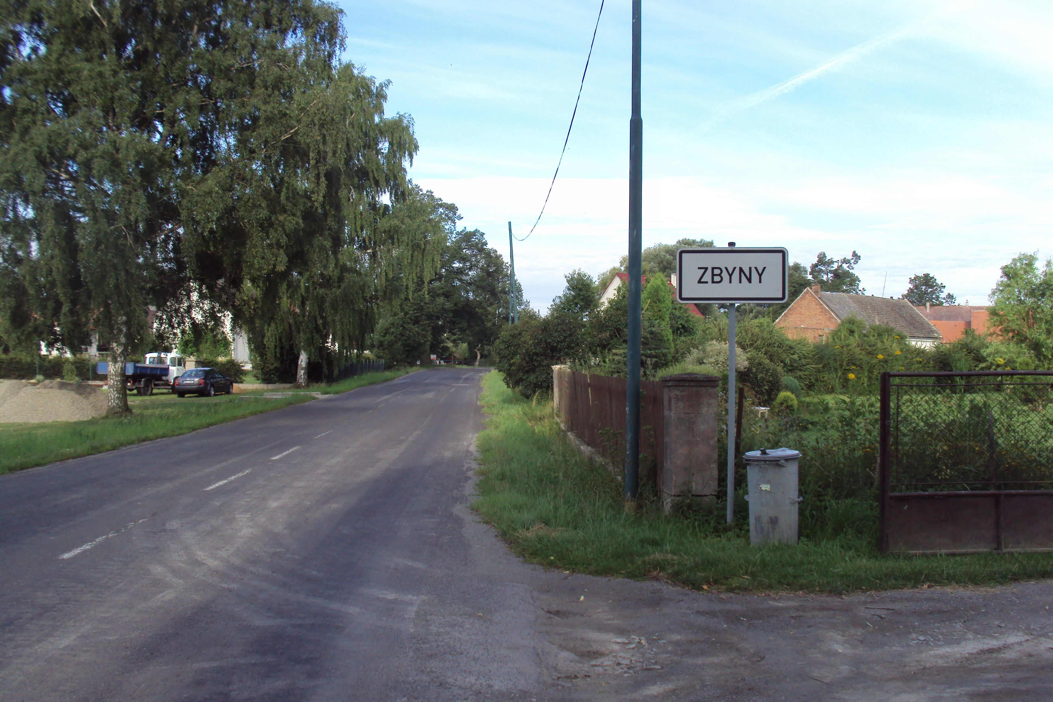 Vesnička je 3 km za Doksy